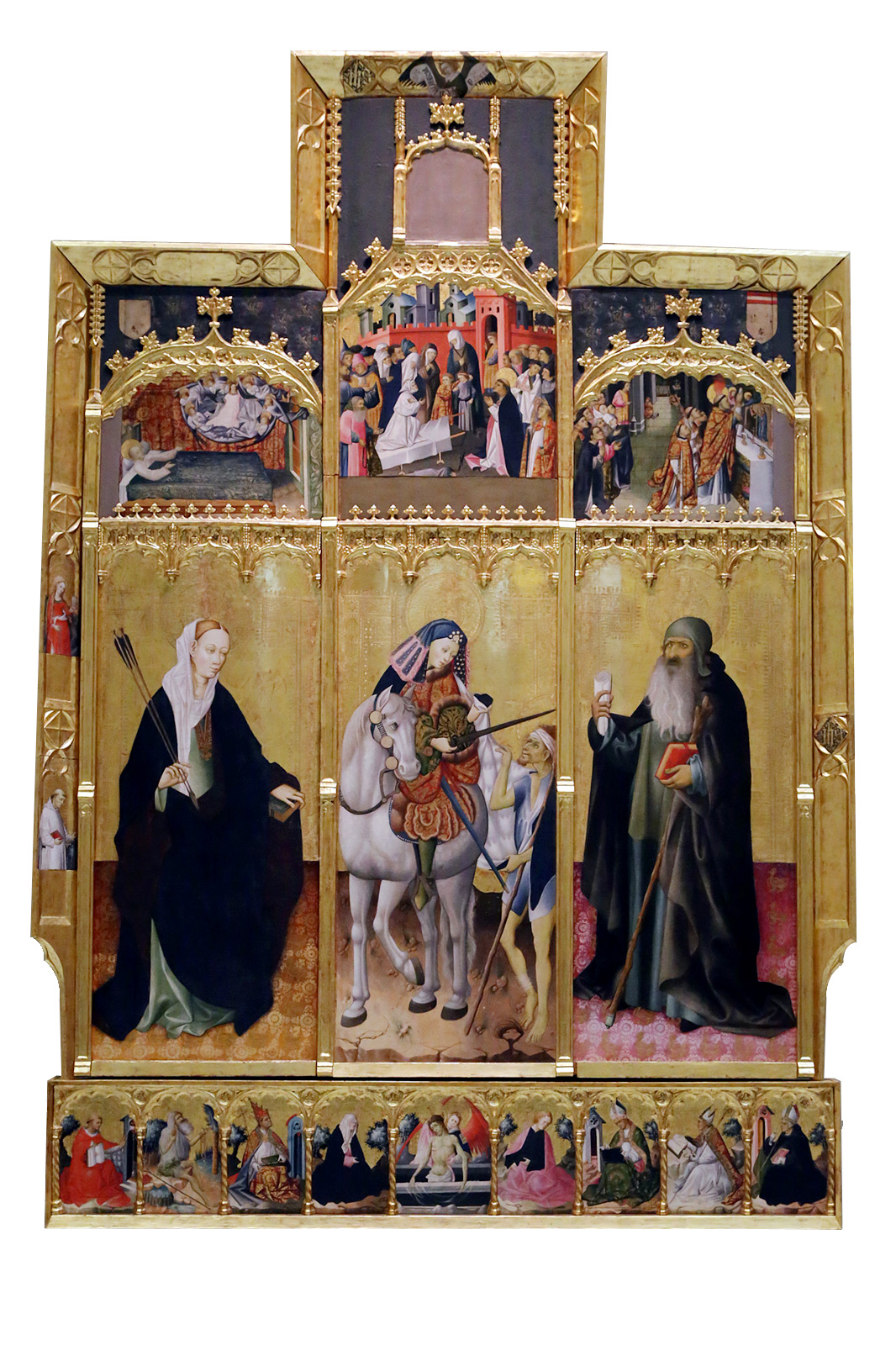 Esta obra, llamada el Retablo de San Martín, Santa Úrsula y San Antonio Abad, procede de la Cartuja de Porta Coeli y debió ser realizada aproximadamente entre 1437 y 1440.